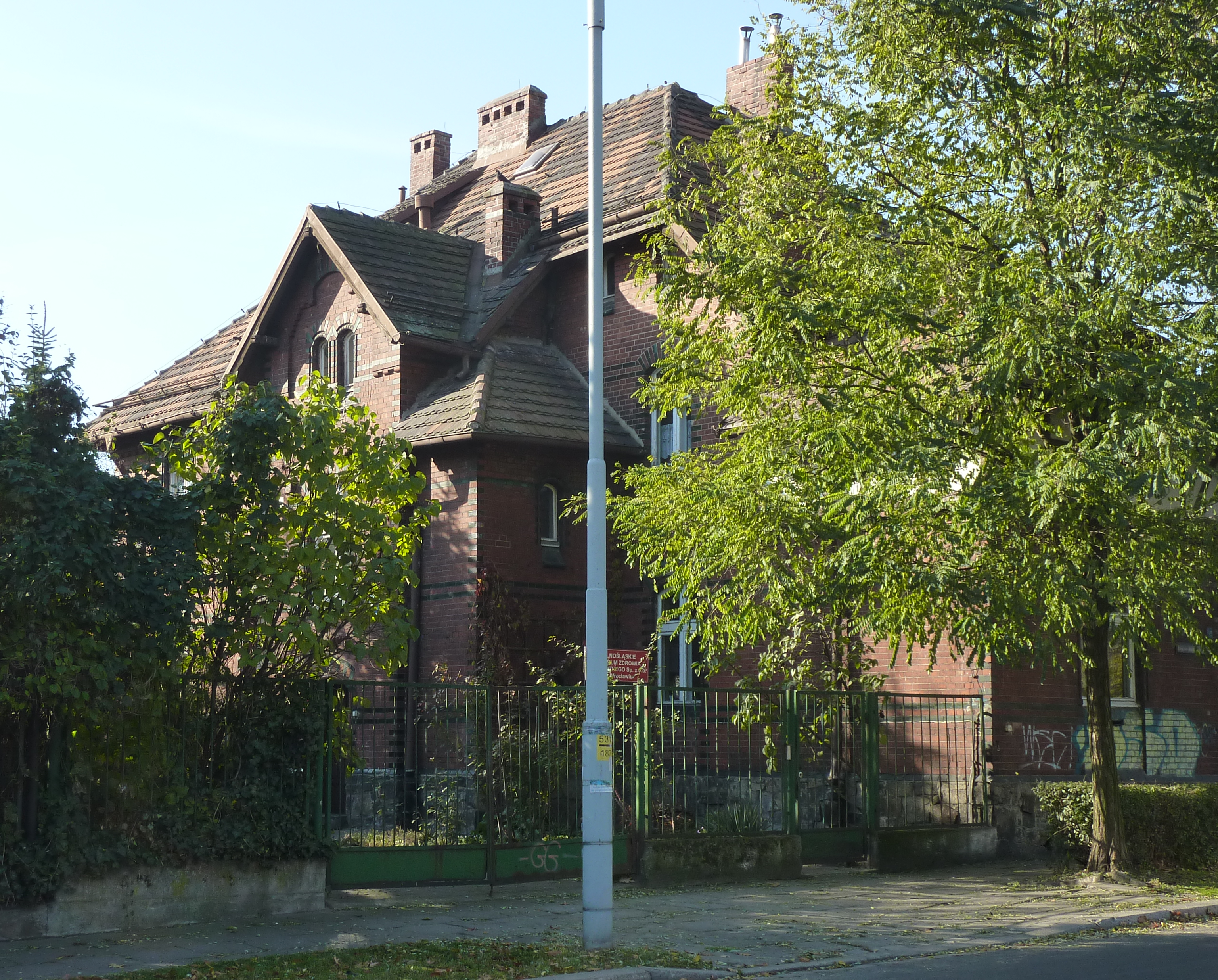 Dawna Rogatka Osobowicka, obecnie siedziba Oddziału VII (budynek "S") Dolnośląskiego Centrum Zdrowia Psychicznego we Wrocławiu przy Wybrzeżu Conrada-Korzeniowskiego 18 – róg ul. Reymonta 13 (przy Mostach Osobowickich); widok z Wybrz. C.-Korzeniowskiego w kierunku południowo-zachodnim.